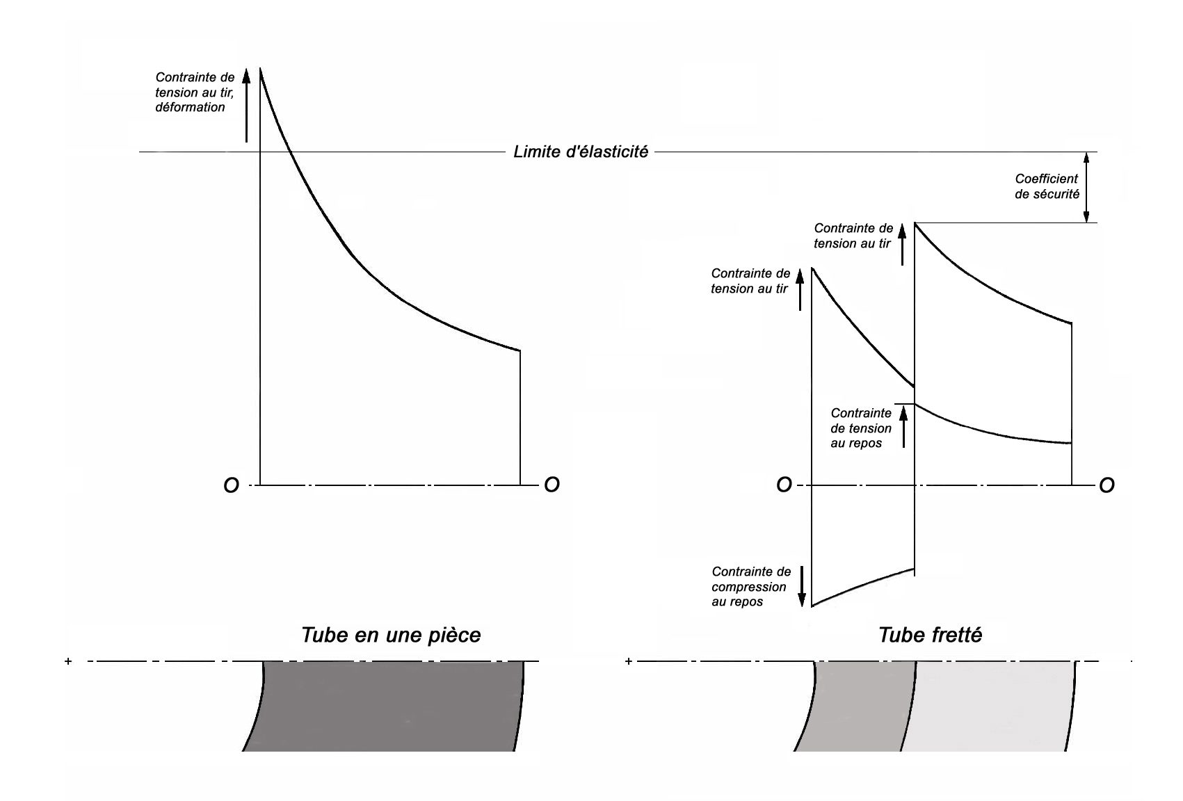 Diagramme contrainte sur acier